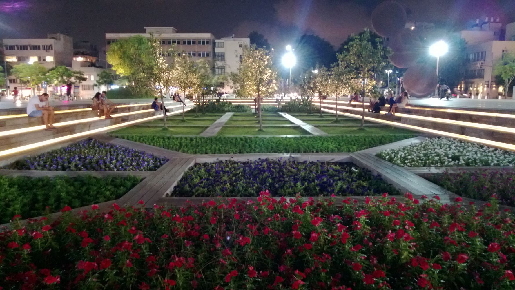 הבימה הוא התיאטרון הלאומי של ישראל. הוא פועל ברציפות, מאז הקמתו הרשמית בשנת 1917, תחילה במוסקבה ואחר כך בארץ ישראל. משנת 1945 משמש את התיאטרון בית הבימה בתל אביב. התיאטרון חבר ב"איחוד תיאטרוני אירופה".